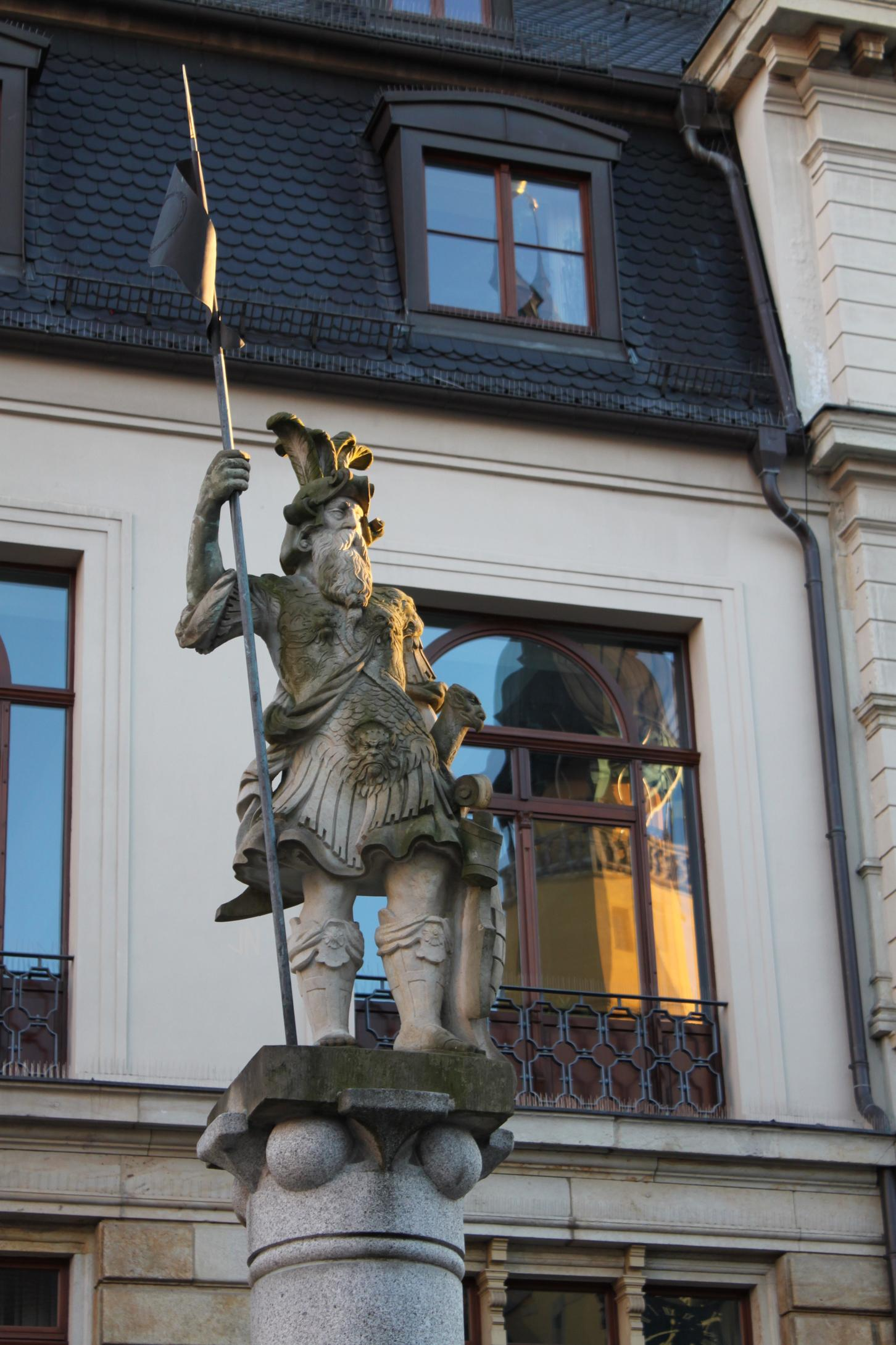 "Ritter Dutschmann" auf dem Hauptmarkt in Bautzen. Hornjoserbsce: "Ryćer Dučman" na Hłownym torhošću w Budyšinje.